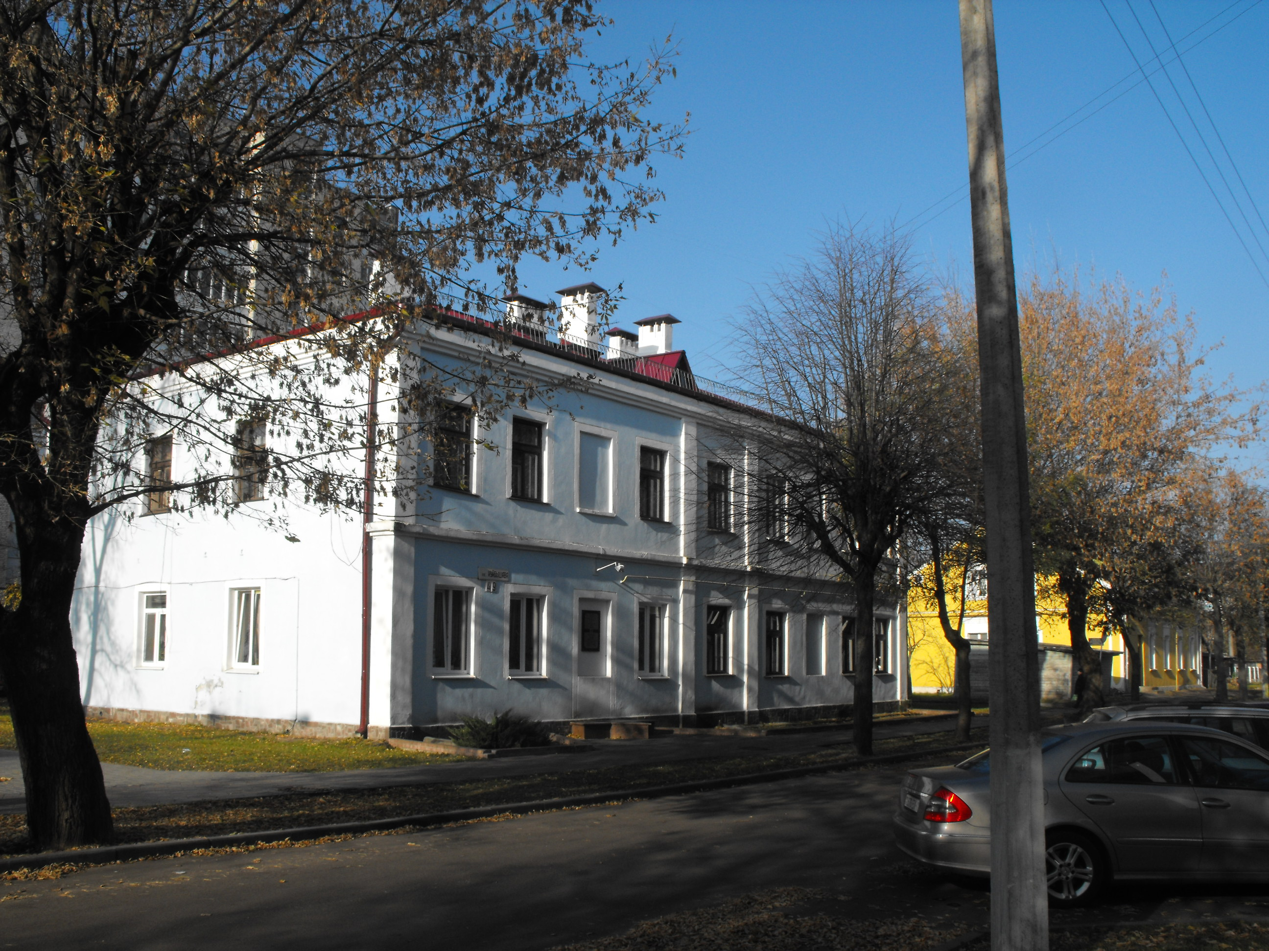 Дом № 49 (здание довоенной иешивы) по ул. Куйбышева, Брест, Беларусь (во время Второй мировой войны - ул. Длинная, на польском ul. Dluga, центр Брестского гетто).